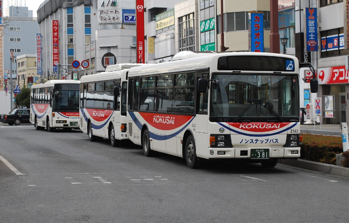 国際十王交通の車両2140号車他。熊谷駅そばの公道上より撮影。